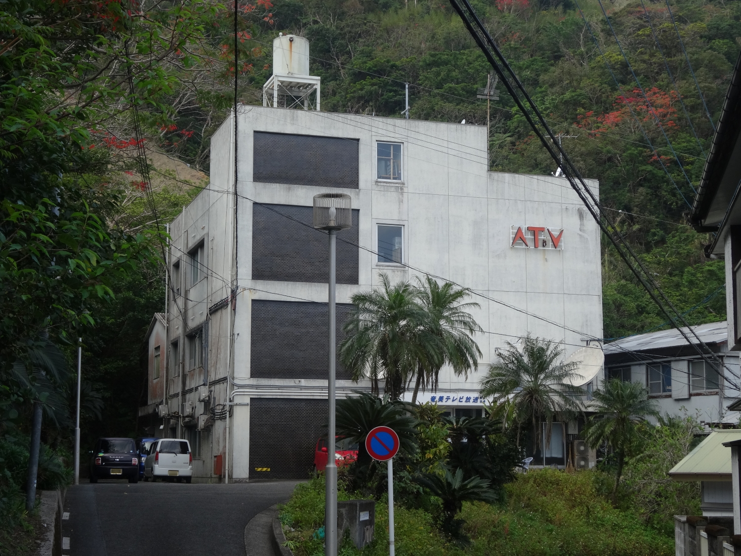 奄美テレビ放送本社